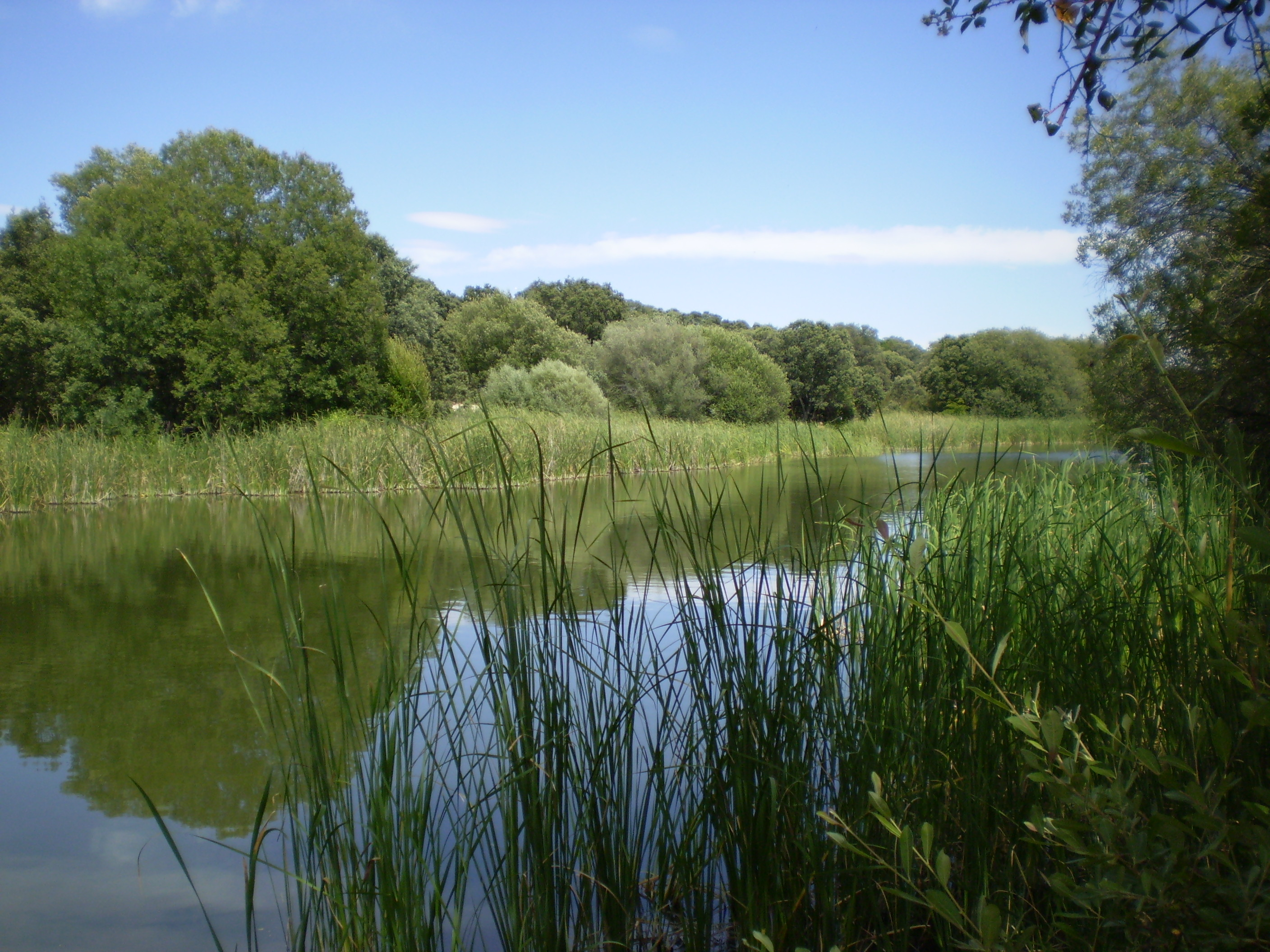 Arroyo Ladrón (afluente del río Aulencia), retenido en el embalse de Los Arroyos. Término municipal de El Escorial, Madrid, Spain